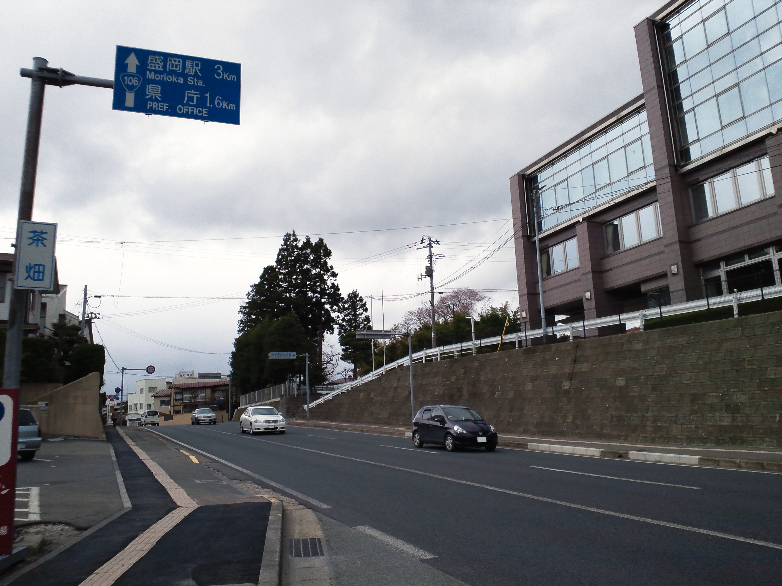 岩手県盛岡市の国道106号。